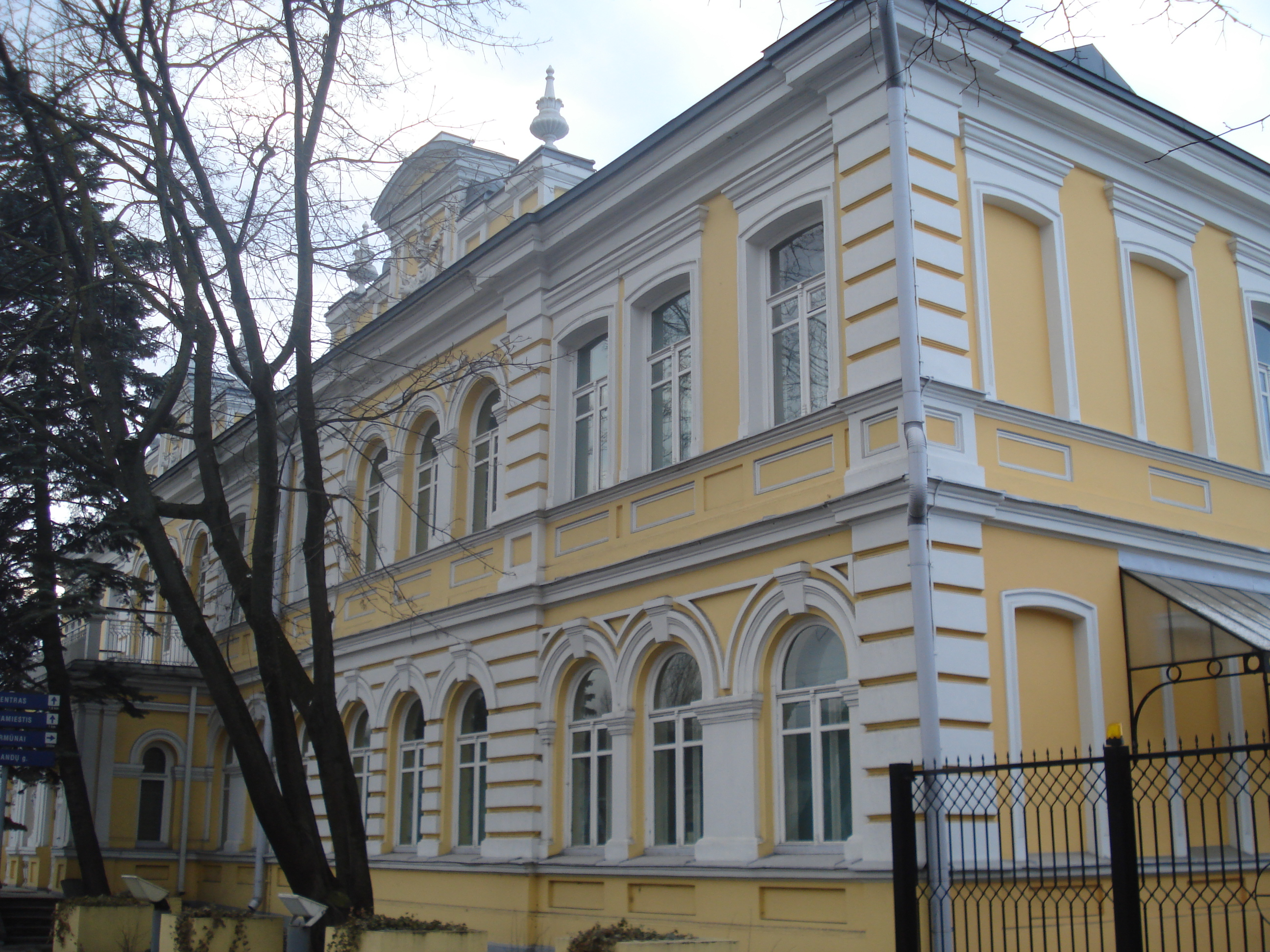 British Embassy in Vilnius (Antakalnio 2)